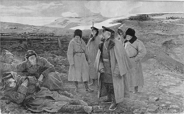 Le général Stoessel visite dans les défenses avancées les survivants de cinq jours et cinq nuits de combat.